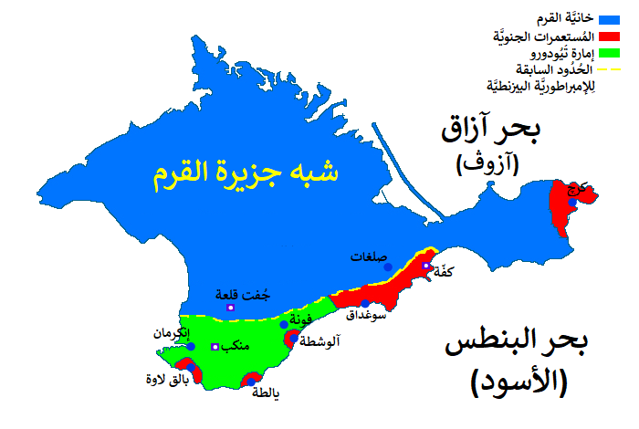 شبه جزيرة القرم في مُنتصف القرن الخامس عشر الميلادي.